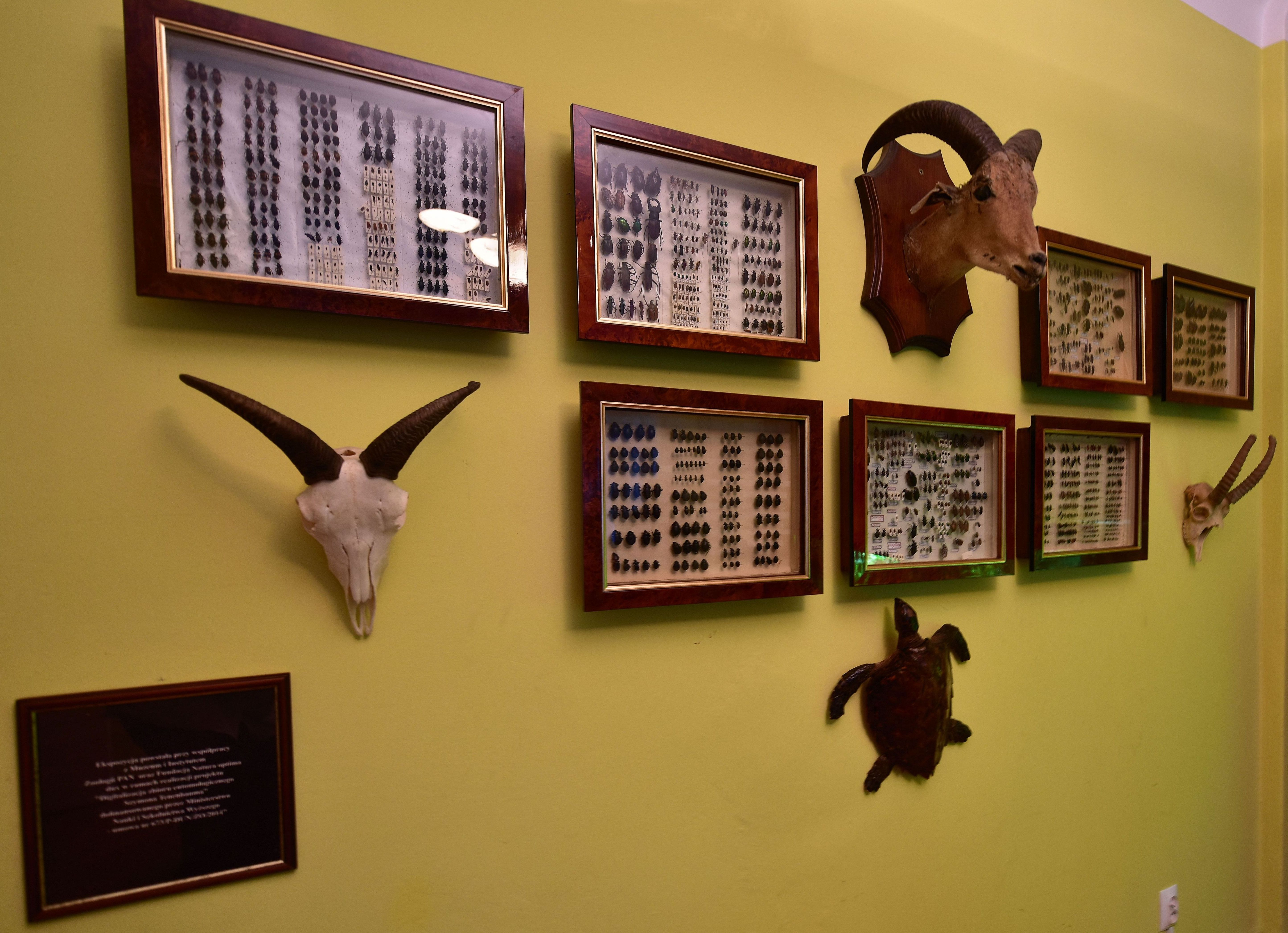 Ogród Zoologiczny w Warszawie, willa Pod Zwariowaną Gwiazdą. Fragment kolekcji owadów Szymona Tenenbauma